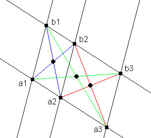 uitleg collineaire punten zelfgemaakt (paint)